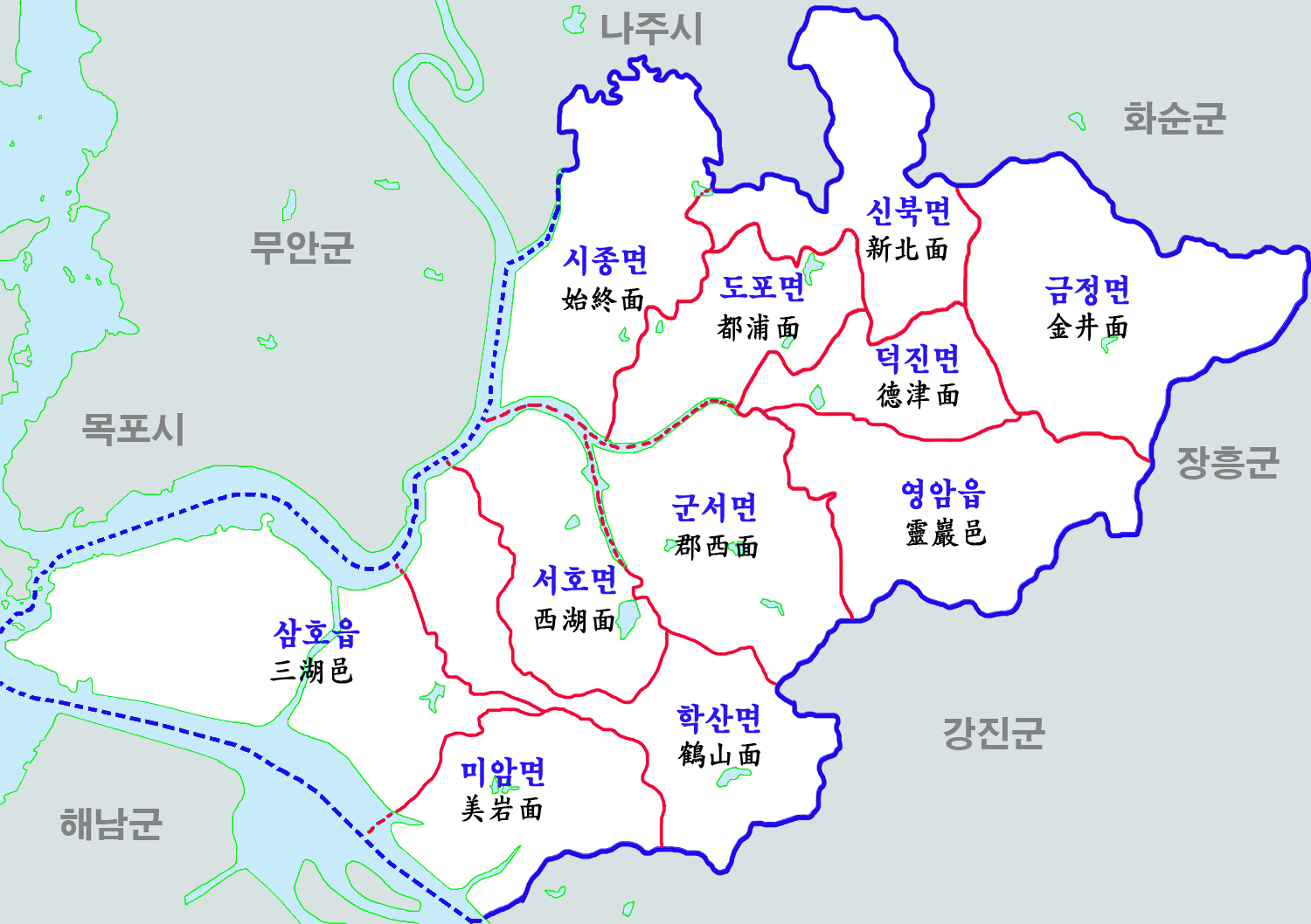 전남 영암군 행정구역도